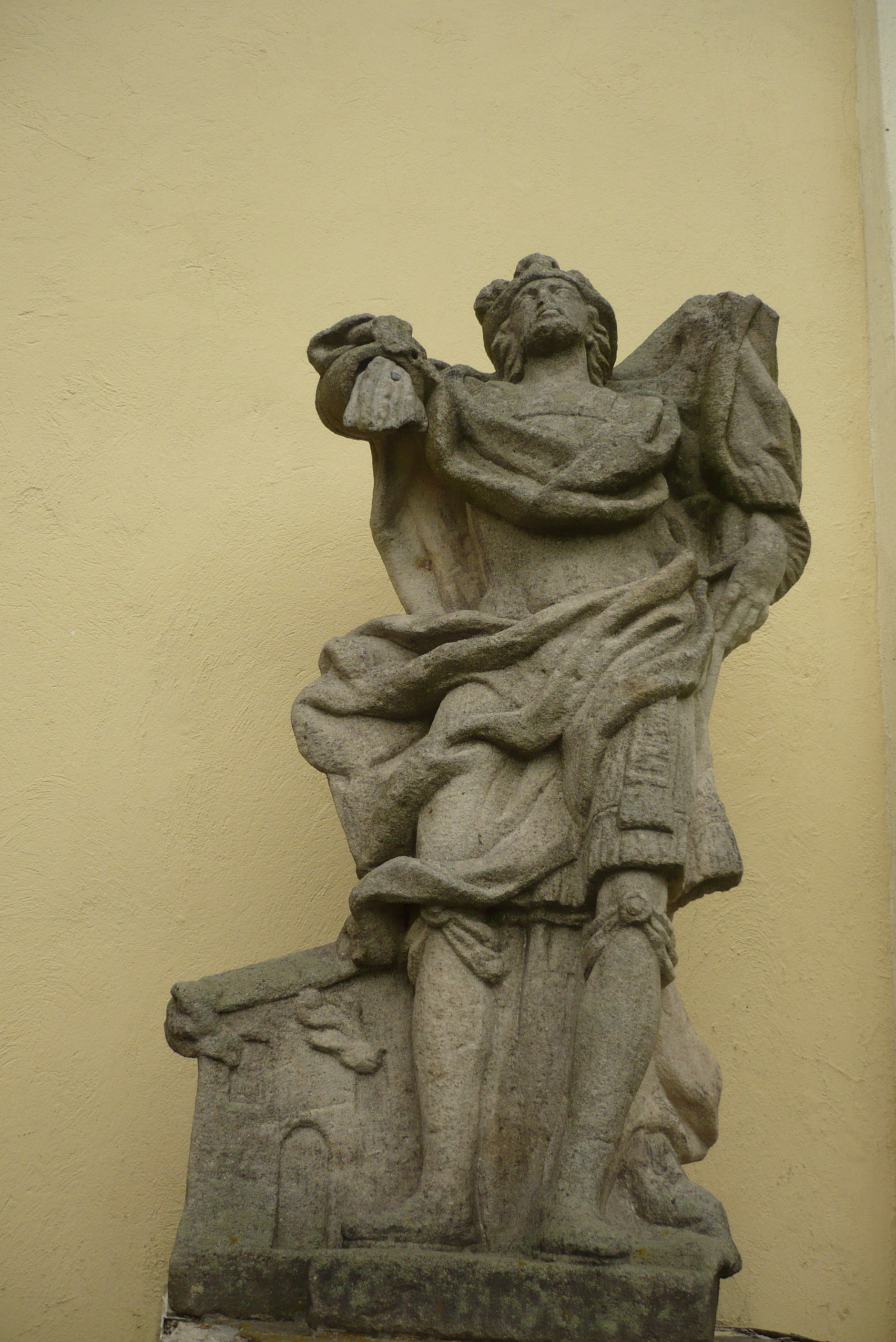 Lutynia - pierwotnie kościół pw. św. Barbary, od 1964 rzymskokatolicki kościół filialny pw. św. Jana Nepomucena, 1784